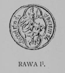 Rawicz Il